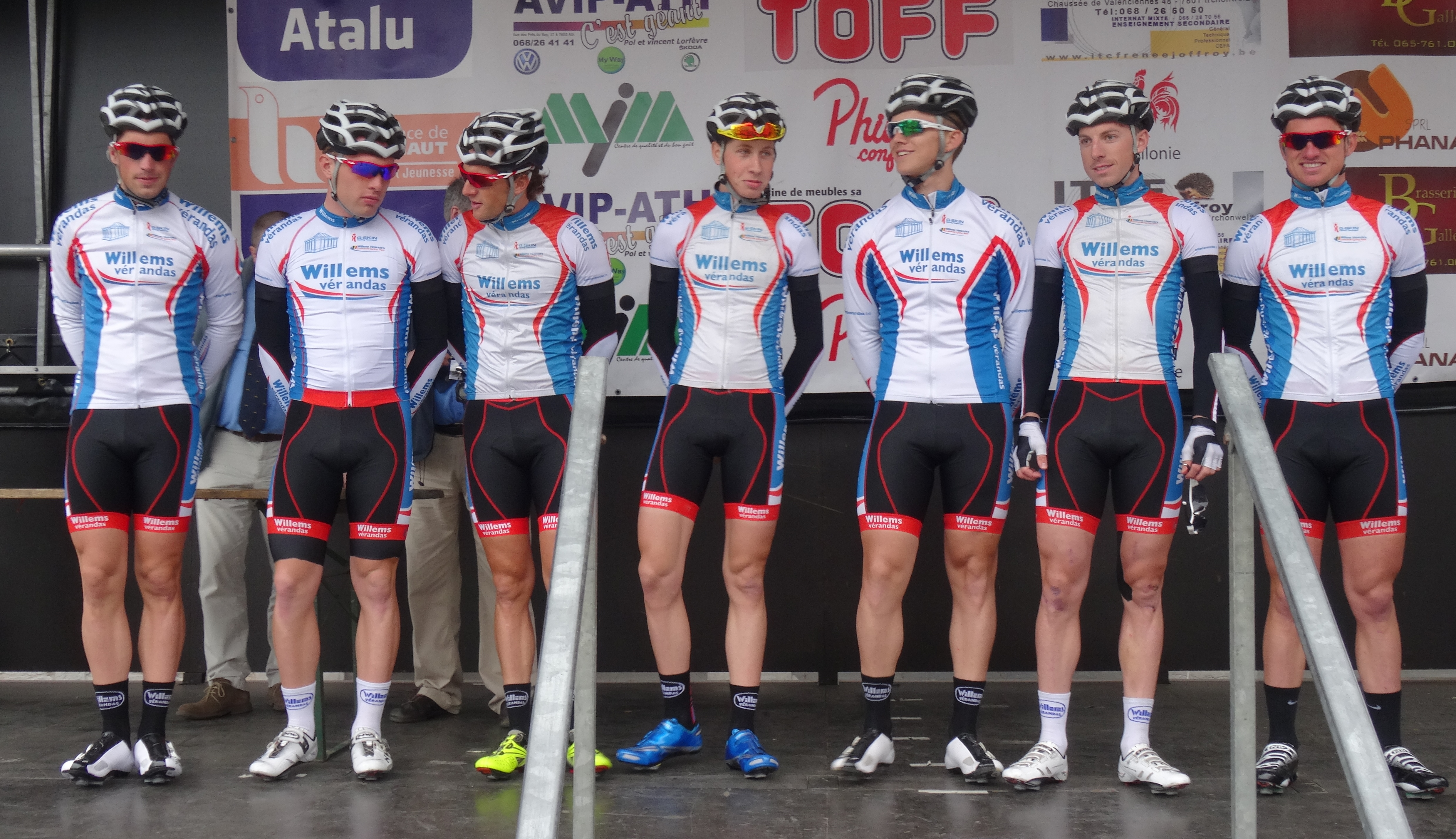 Triptyque des Monts et Châteaux 2014, étape 1, 4 avril 2014, départ d'Antoing. The creation of these files was made possible thanks to the organizers of the Triptyque des Monts et Châteaux 2014 English | français | +/− Depicted team: Verandas Willems The creation of these files was made possible thanks to the organizers of the Triptyque des Monts et Châteaux 2014 English | français | +/−